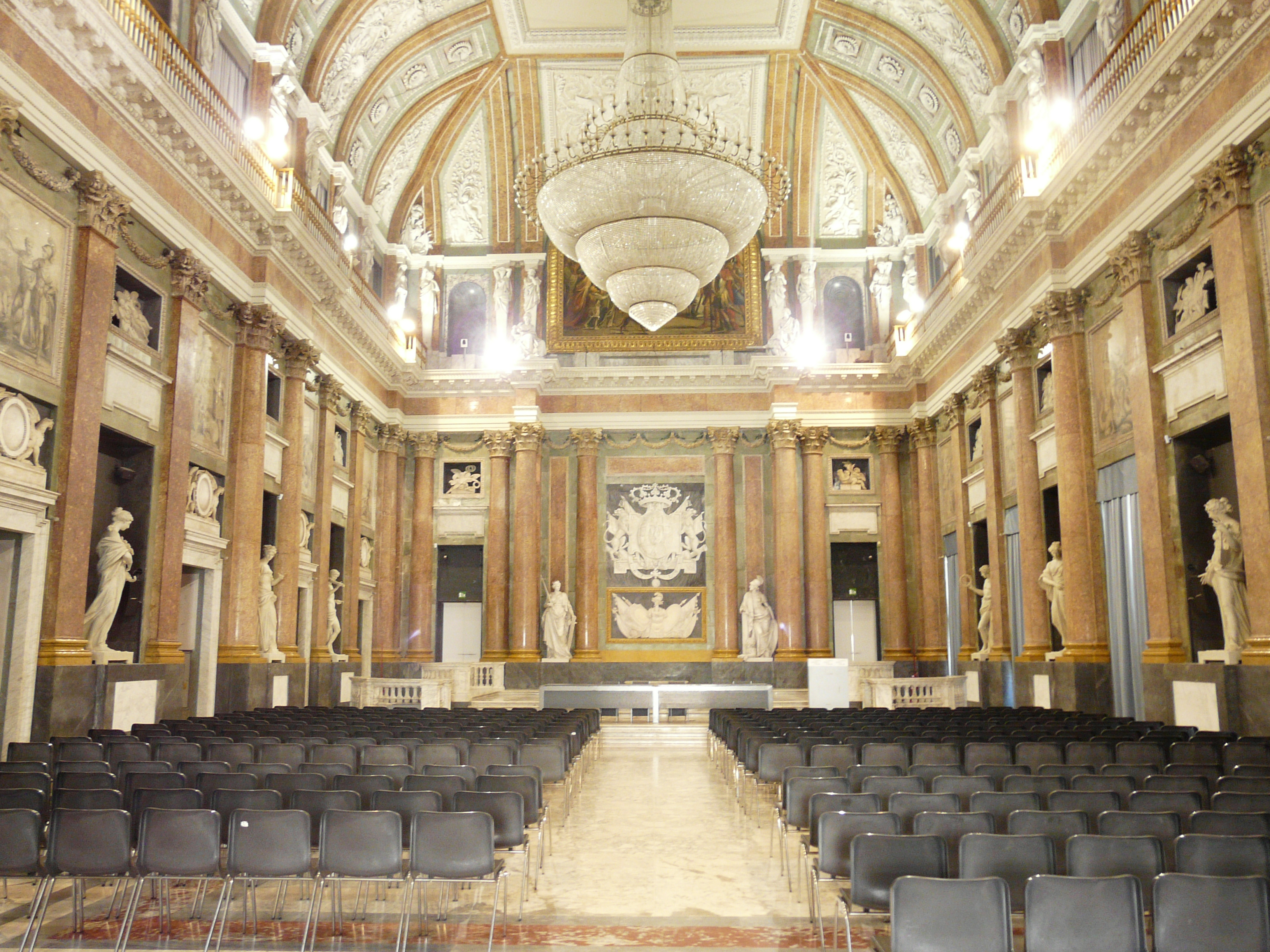 Sala del Maggior Consiglio, Palazzo Ducale, Genova, Liguria, Italia